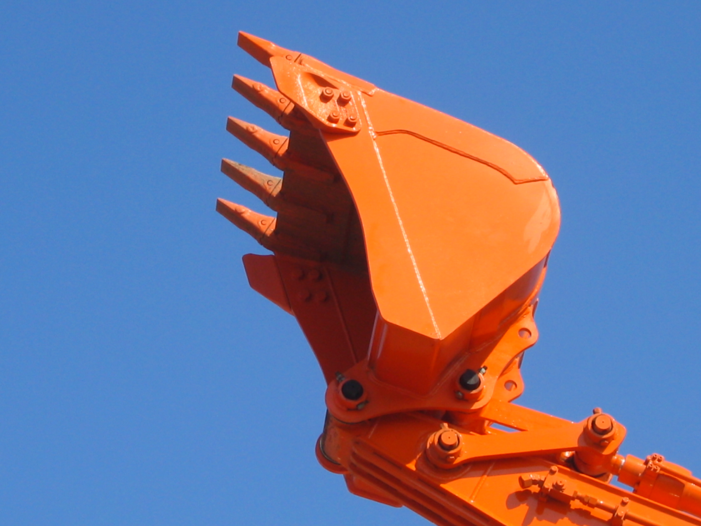 Ŝovelilo